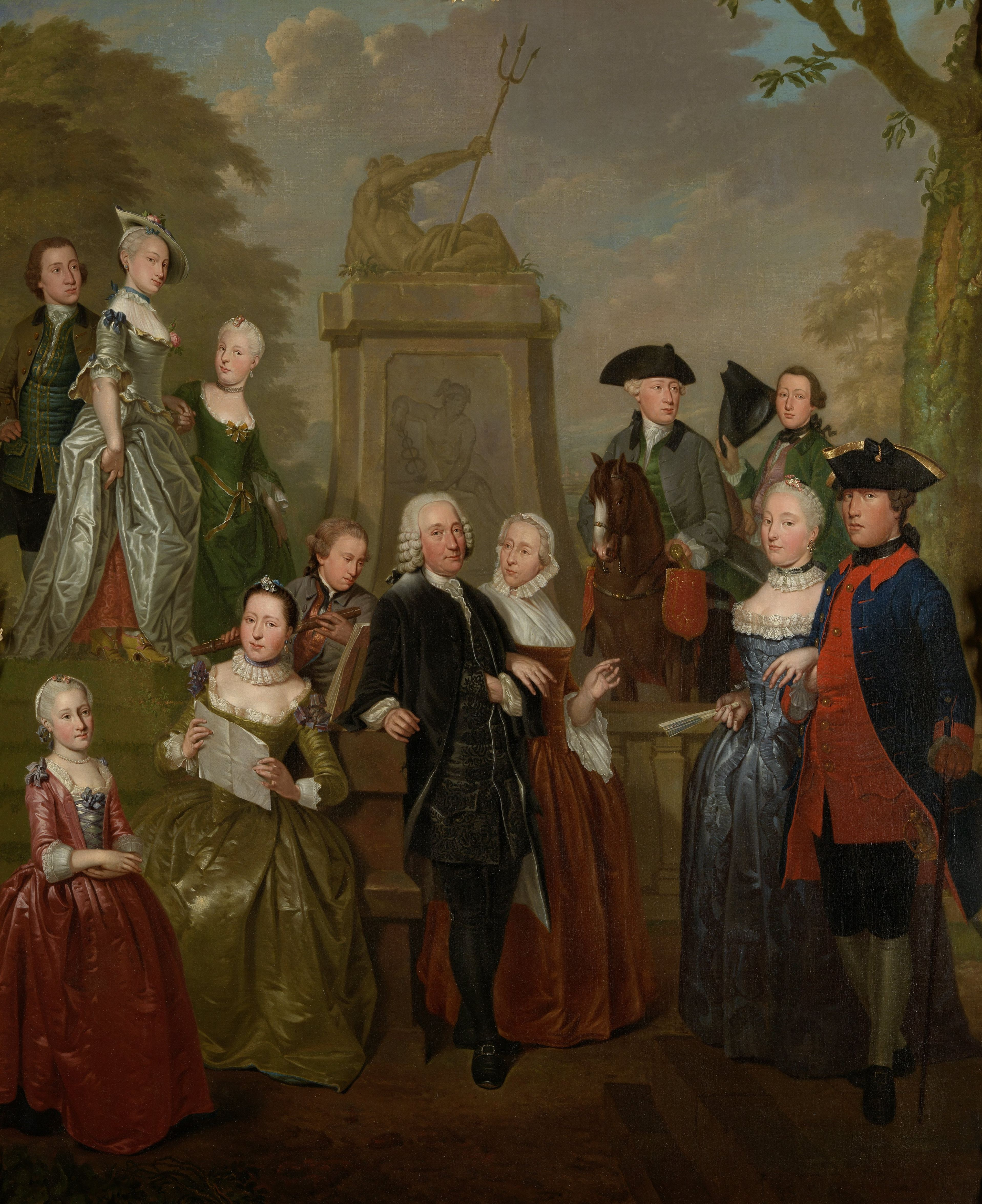 Portret van Theodorus Bisdom van Vliet (1698-1777), burgemeester van Haastrecht en hoogheemraad van de Krimpenerwaard, en zijn vrouw Maria van Harthals (1703-63) met hun gezin op een terras in de tuin van zijn huis te Haastrecht